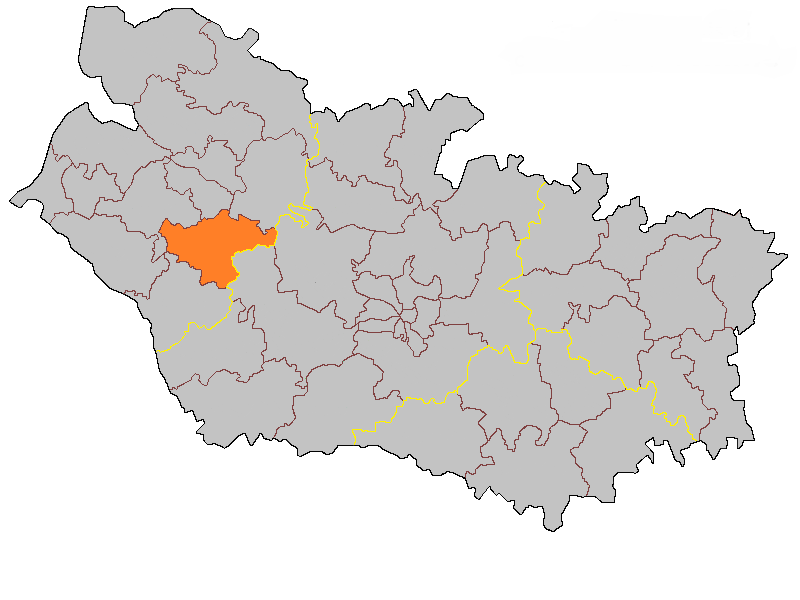 Кантон Алланкур на карте департамента Сомма